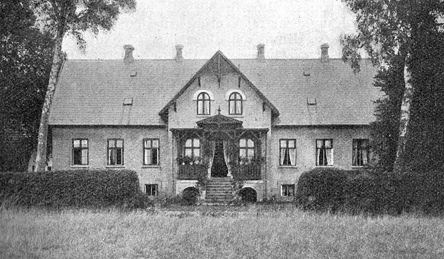 Lehnskov er en gammel hovedgård, den nævnes første gang i 1412, da kaldt Lindskov. Navnet Lehnskov er fra 1725. Lehnskov var da en avlsgård under Hvidkilde Gods til 1925. Gården ligger i Egense Sogn, Sunds Herred, Svendborg Kommune.